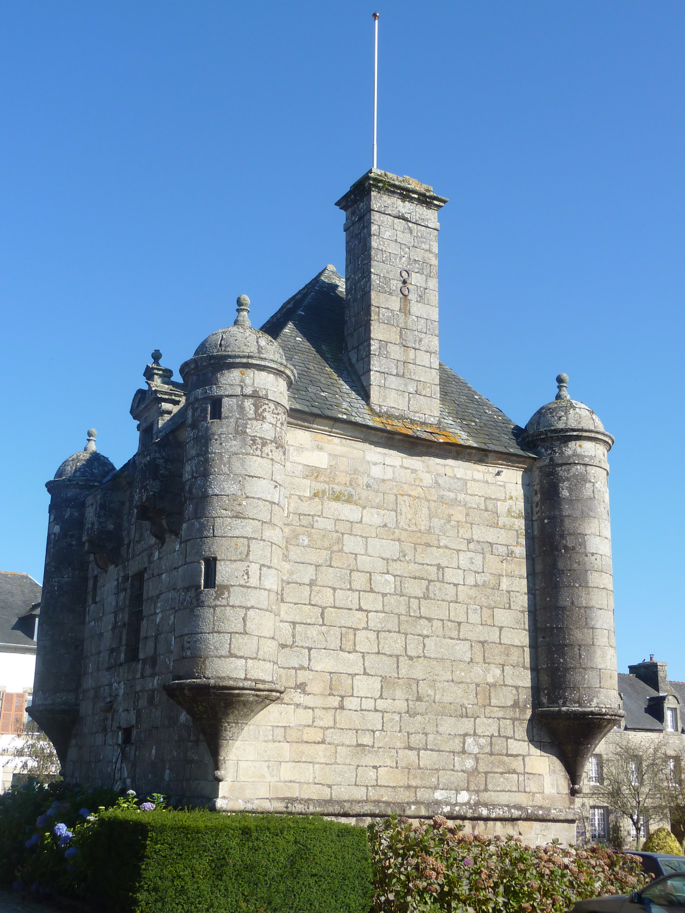 Guerlesquin : le présidial 2